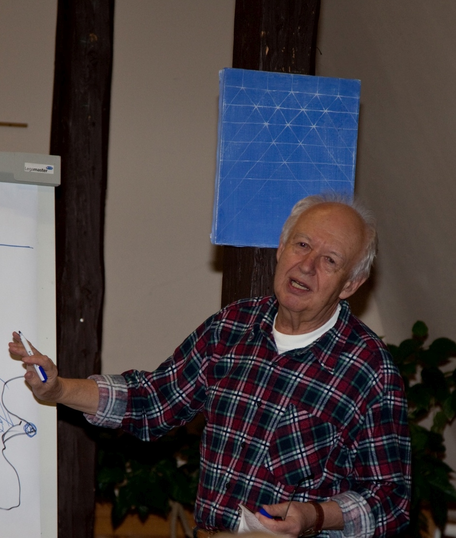 Při přednášce